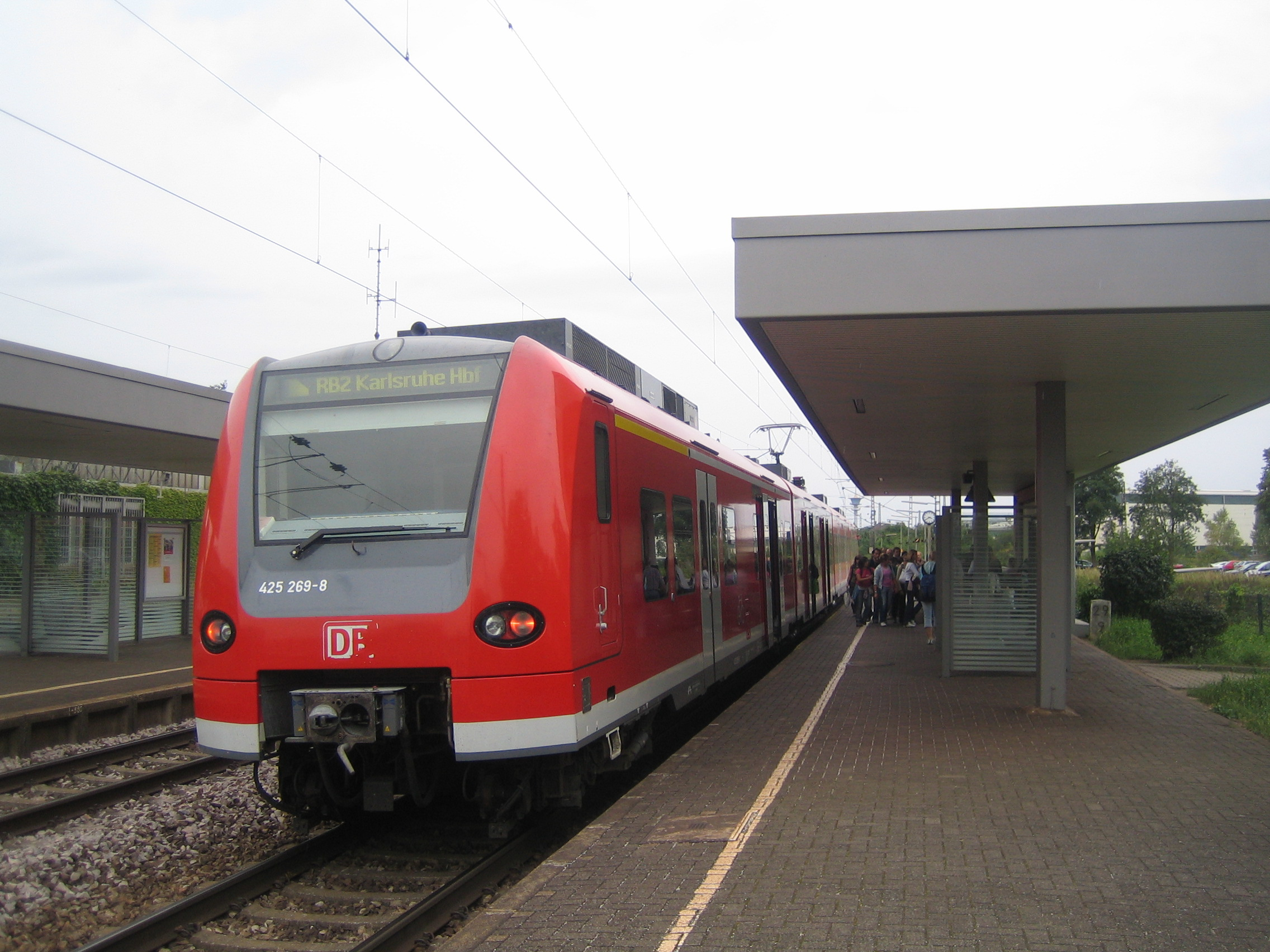 Zug im Bf. Waghäusel